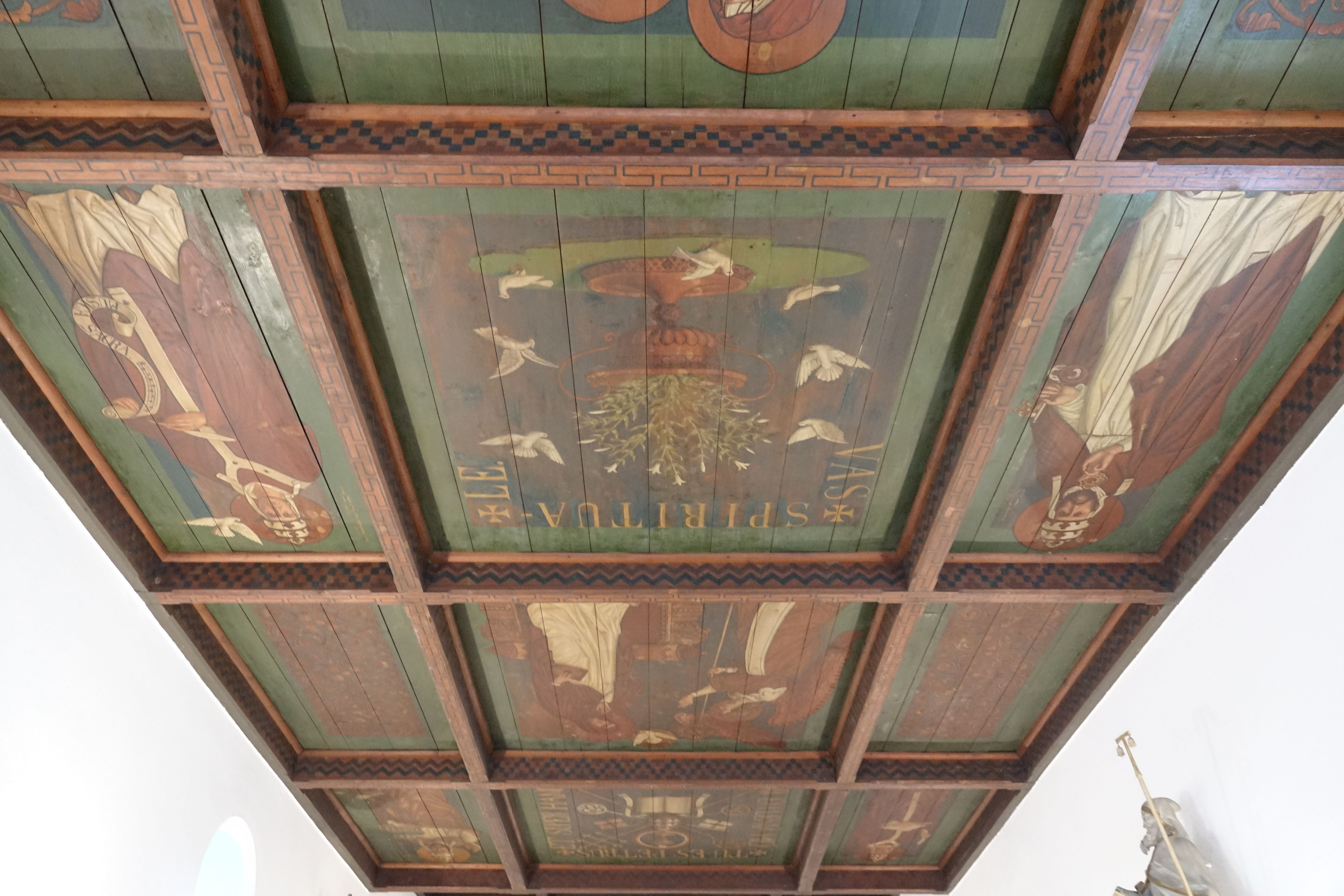 St. Peter (Kempen) - Holzdecke: Teilbild der HolzdeckeThis is a photograph of an architectural monument., no. 15